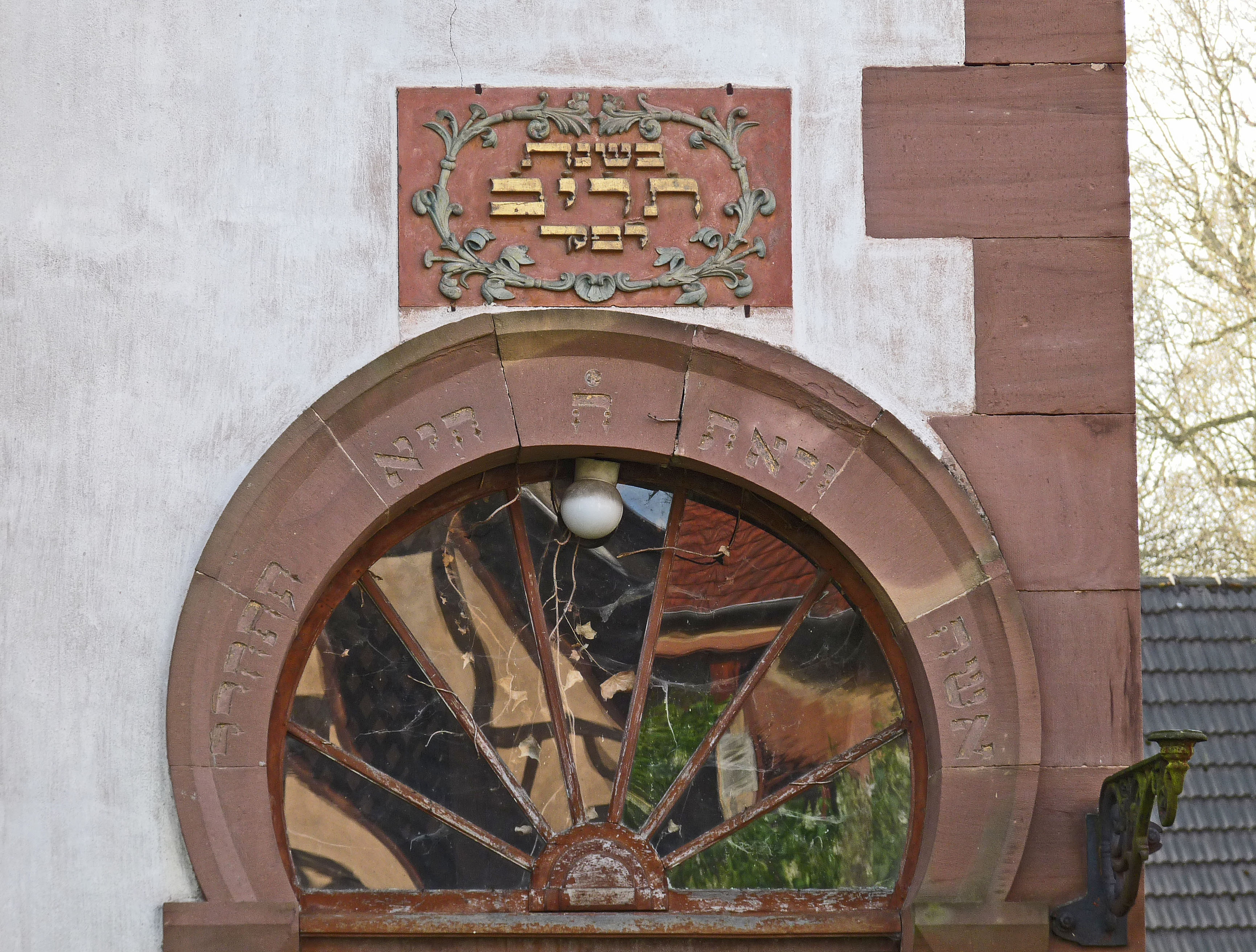 Ancienne synagogue de Reichshoffen (Bas-Rhin).